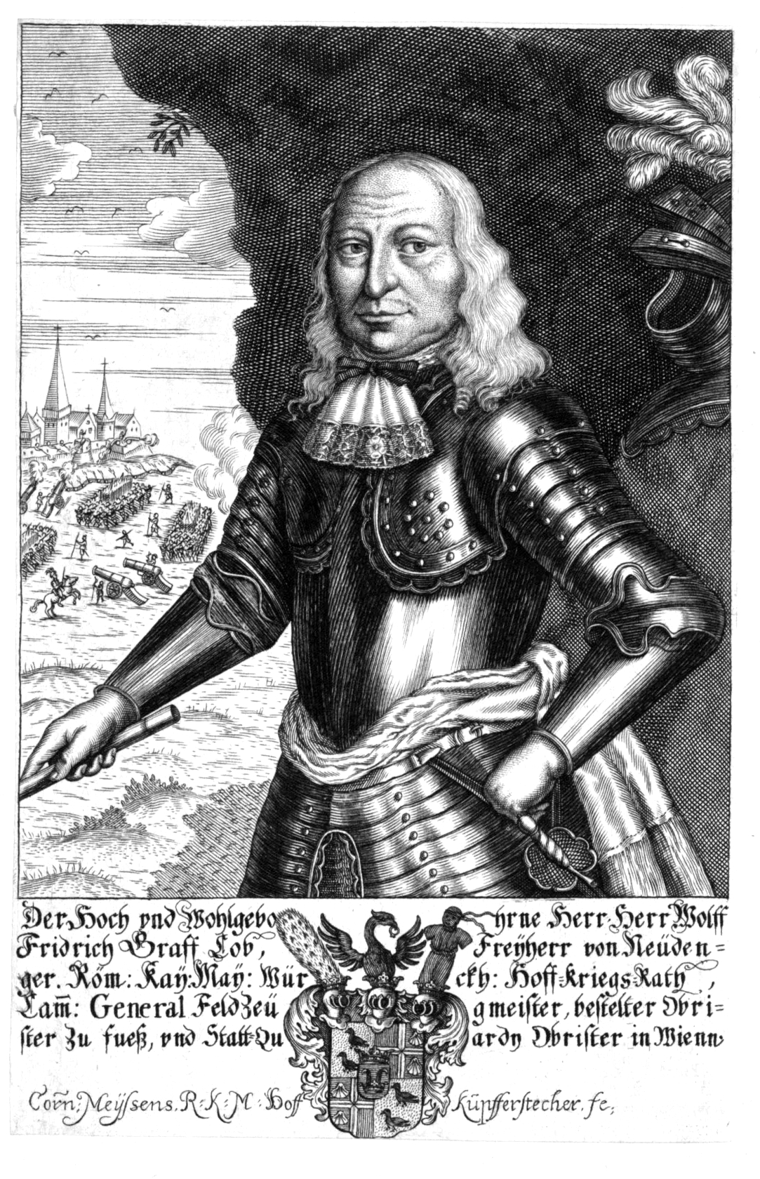 Bildnis Wolfgang Friedrich Cob, Kupferstich, um 1676.